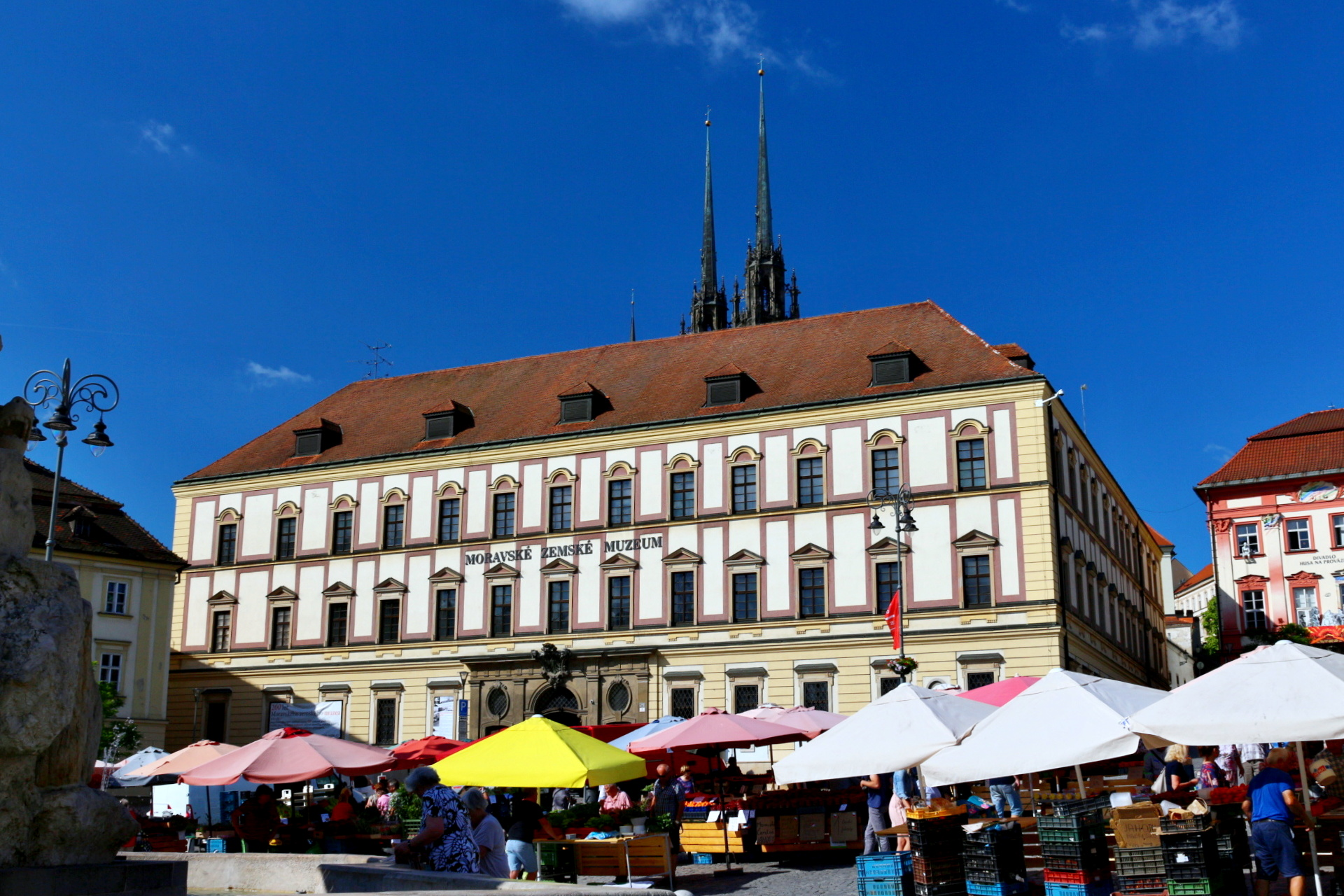 Zelný trh (Brno)